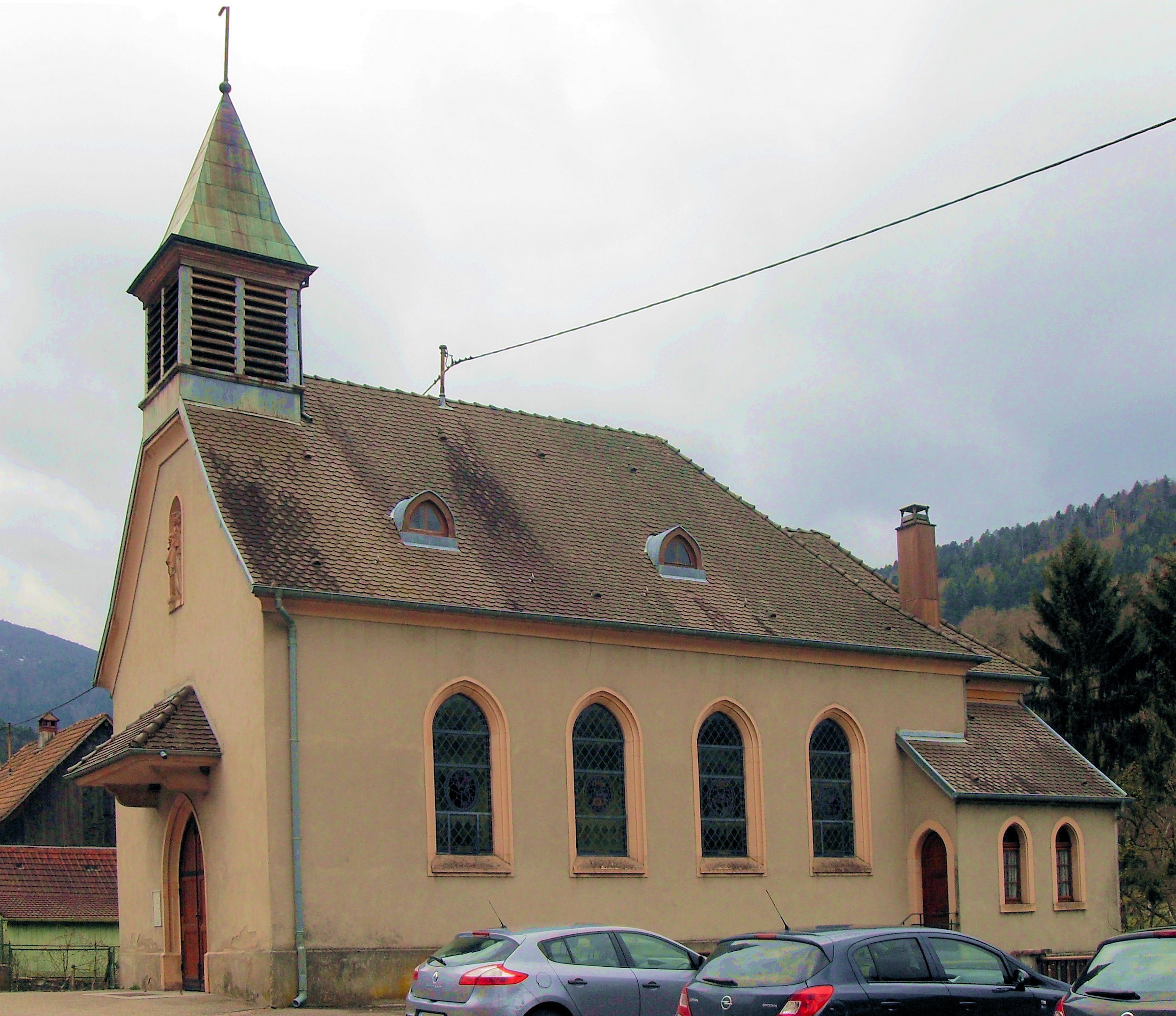 L'église Saint-Joseph à Storckensohn